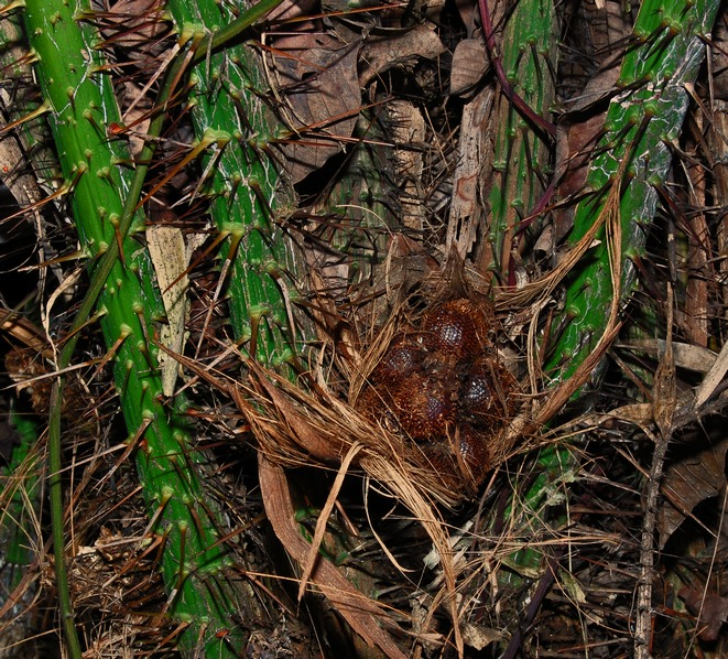 Salacca zalacca, young fruit. Darmaga, Bogor, West Java, Indonesia